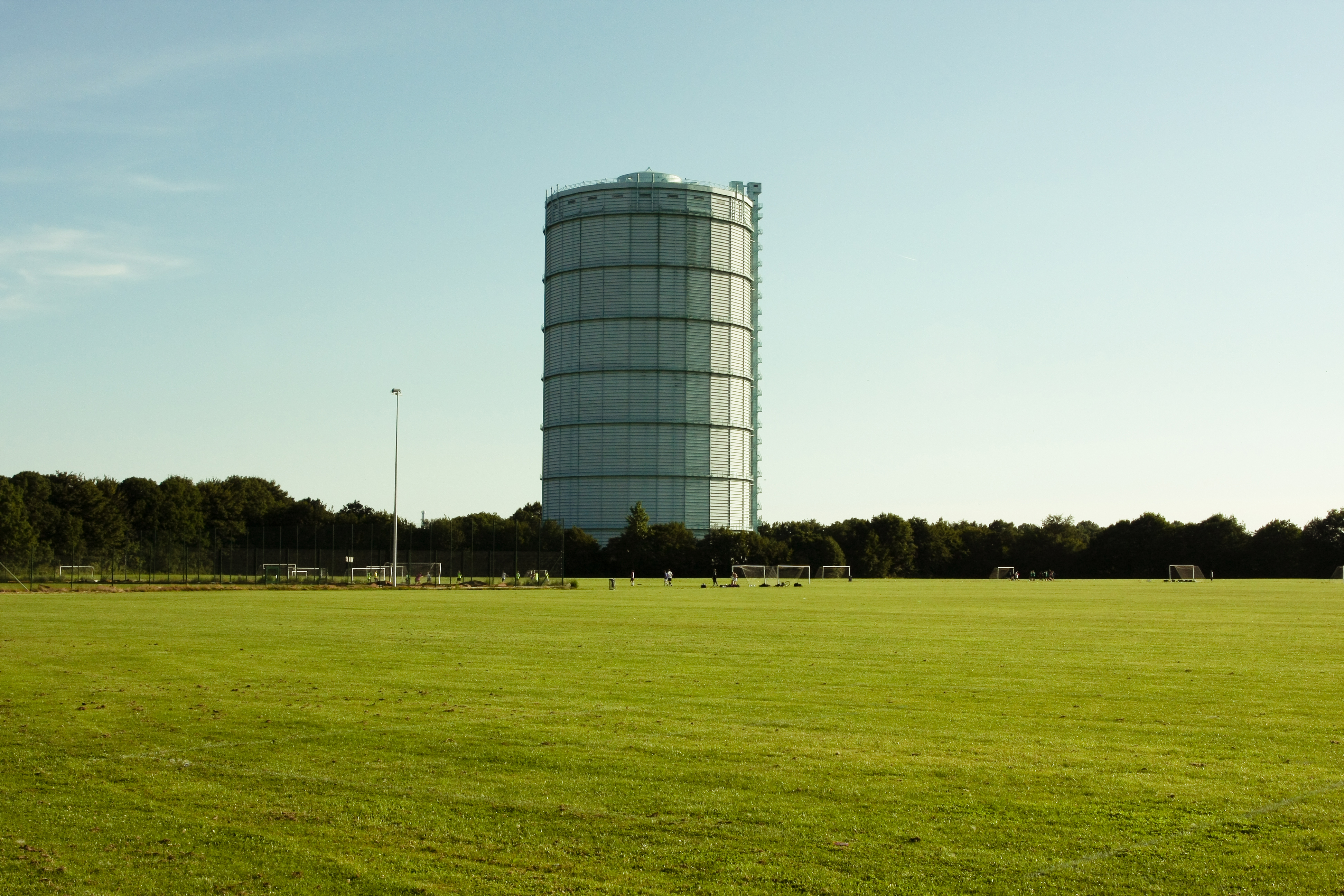 Køgevej Gasbeholder. Også kendt som Valby Gassilo eller Gasbeholderen i Valby. Den er ikke i brug siden Sundby Gasværk blev lukket.